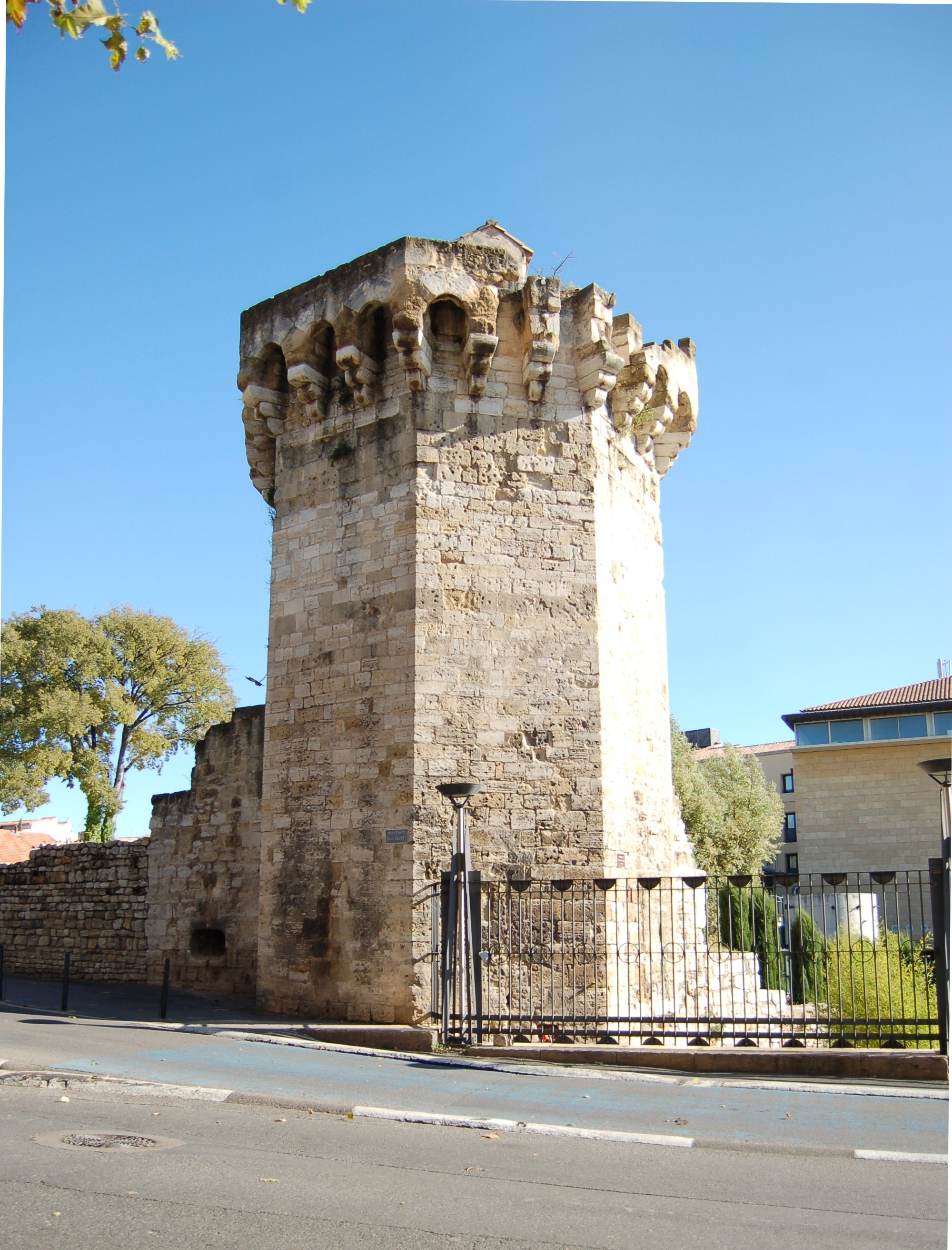 La Tourreluque, dernier vestige de l'enceinte médiévale de Aix-en-Provence.